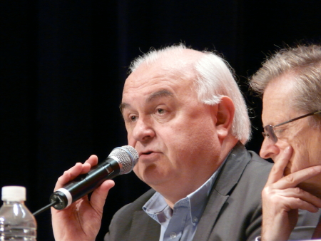 Bernard Lehideux, lors d'une Convention du MoDem sur l'Europe, Maison de la Chimie à Paris, le 8 juin 2008